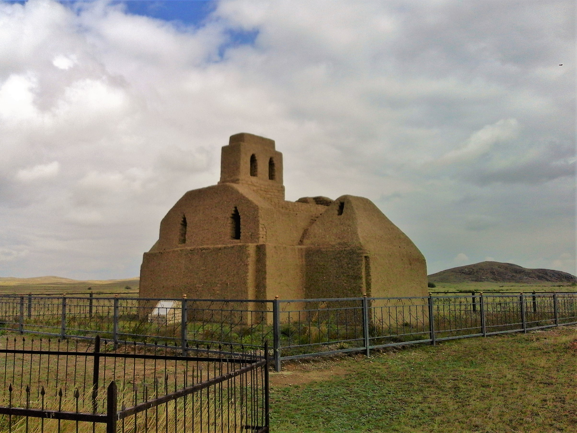 Мавзолей волостного управителя Нурлана Байсеитова